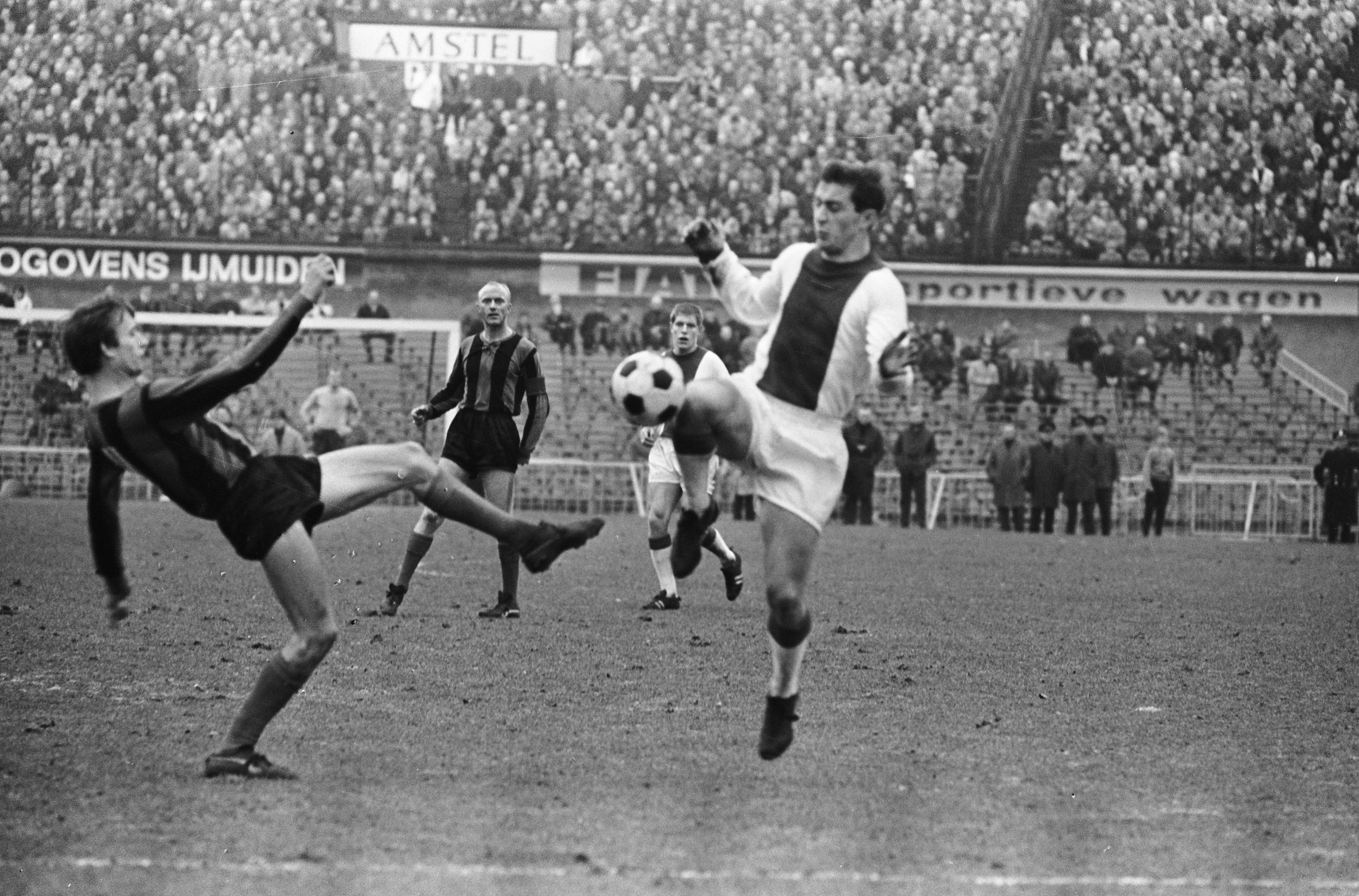 Collectie / Archief : Fotocollectie Anefo Reportage / Serie : [ onbekend ] Beschrijving : DWS tegen Ajax 1-1, duel tussen Suurbier en Rensenbrink Datum : 22 januari 1967 Trefwoorden : duels, sport, voetbal Persoonsnaam : Rensenbrink, Rob, Suurbier, Wim Fotograaf : Kroon, Ron / Anefo Auteursrechthebbende : Nationaal Archief Materiaalsoort : Negatief (zwart/wit) Nummer archiefinventaris : bekijk toegang 2.24.01.05 Bestanddeelnummer : 920-0053